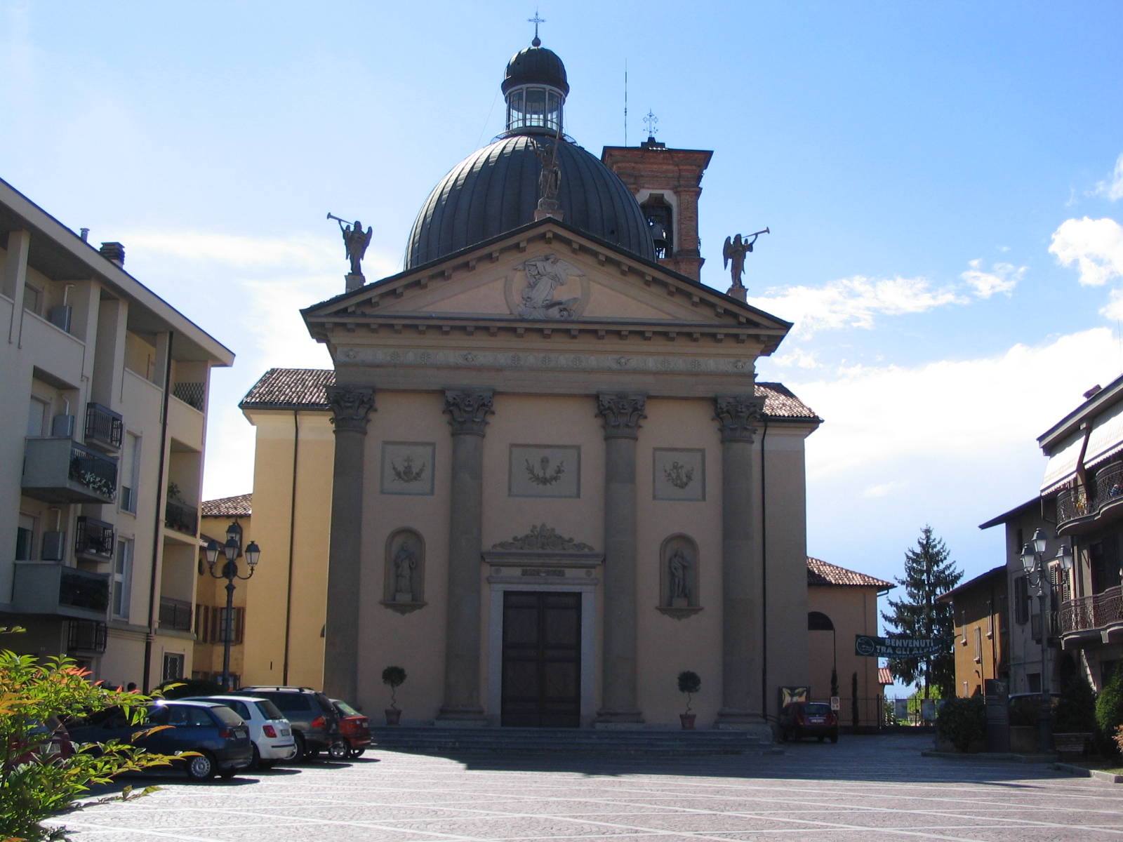 Autore Giorces. Pontirolo Nuovo, la Parrocchiale.